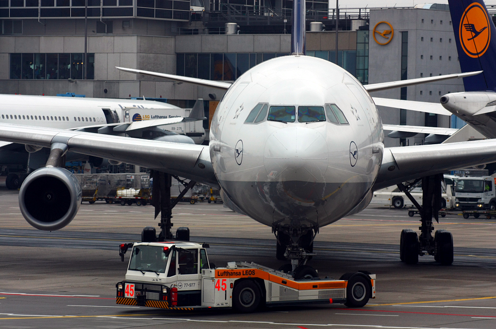 reg.: D-AIGL